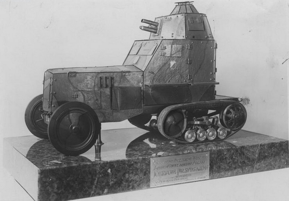 Model samochodu pancernego wz. 28 ofiarowany marsz. Piłsudskiemu przez 4 dywizjon pancerny w roku 1932. Później prezentowany w Muzeum Belwederskim oraz w Muzeum Techniki i Przemysłu w Warszawie.